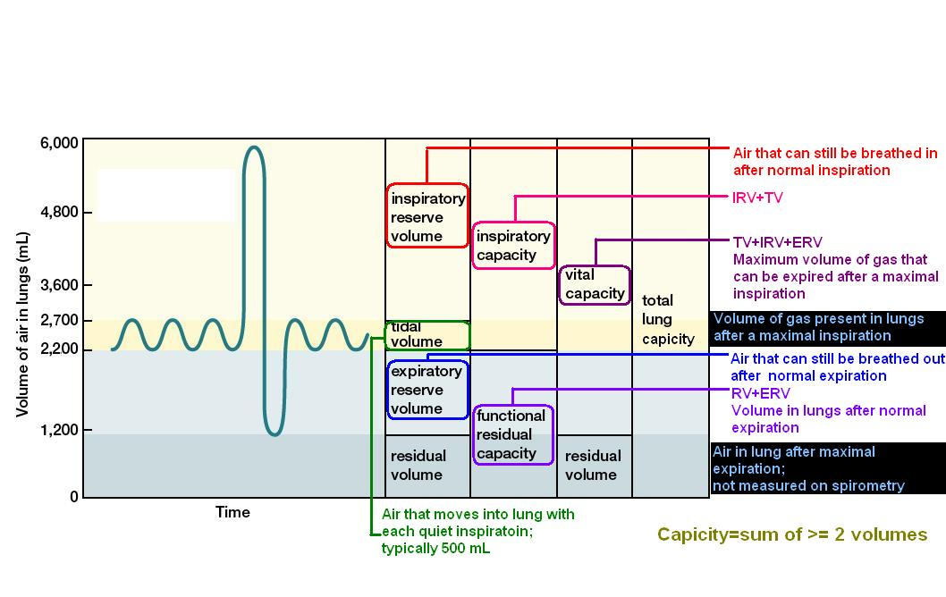 呼吸生理學